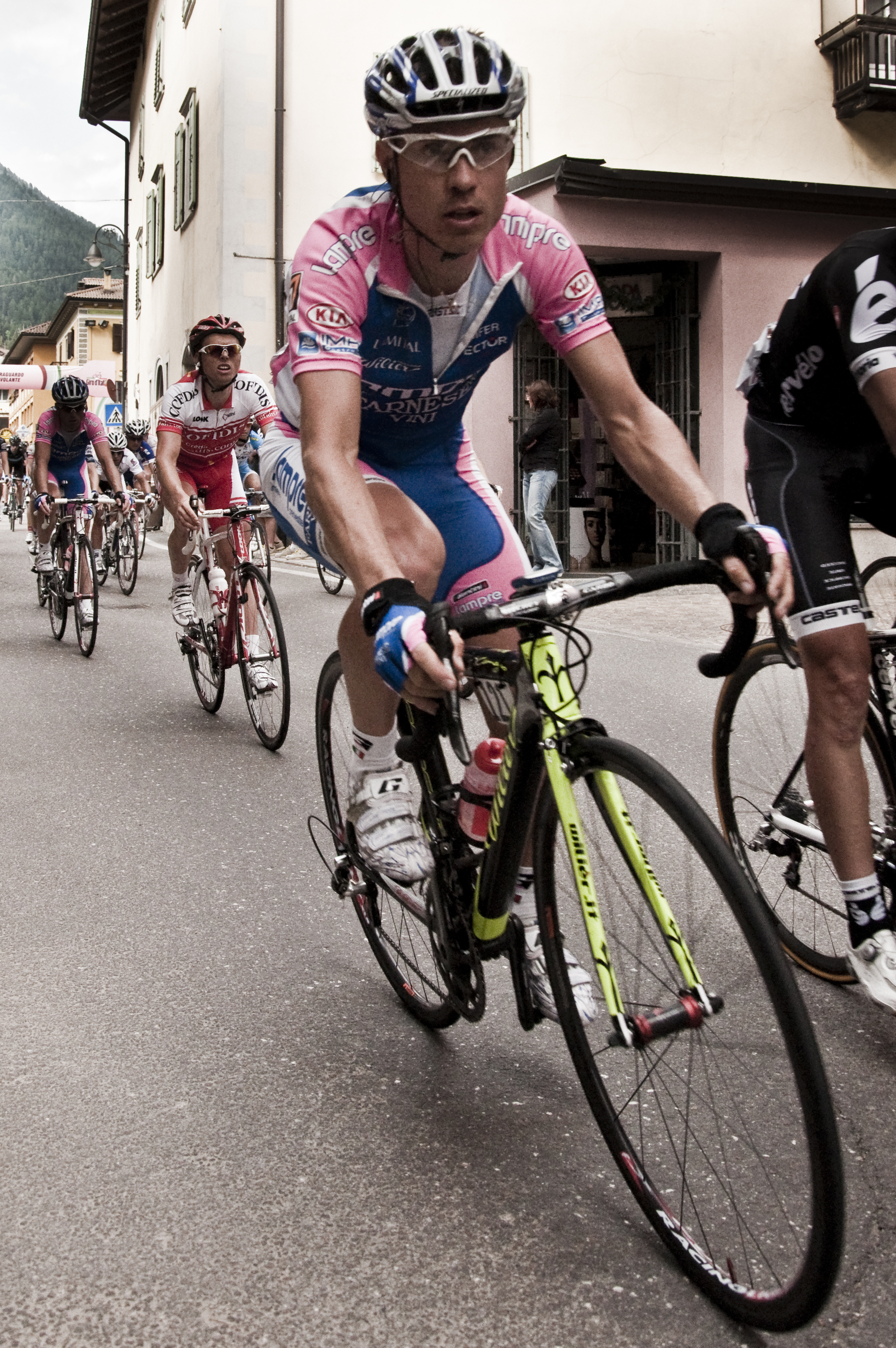 In ginocchio per venti secondi di panico, scattare a casaccio, tornare a casa distrutto dalle allergie a inediti pollini trentini, aprire le foto, e trovare quella del tuo ciclista preferito. Impagabile.